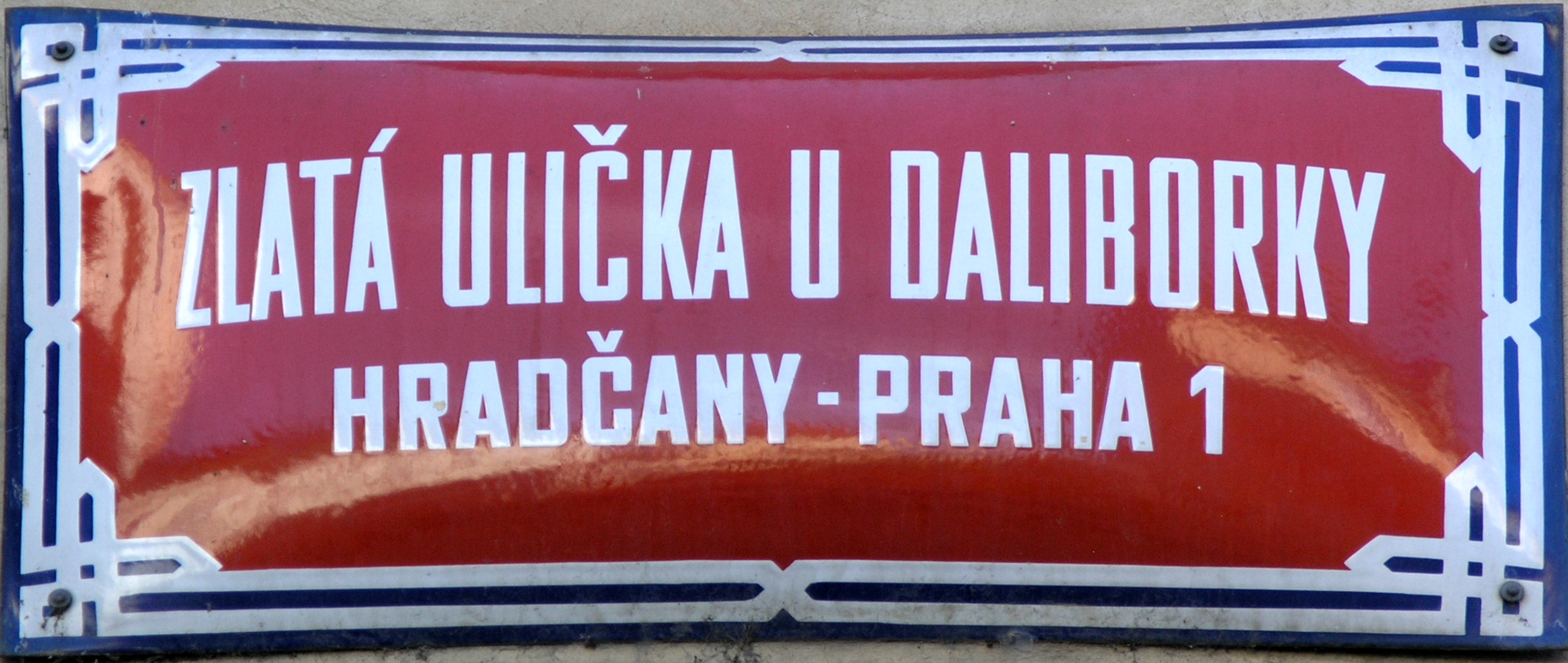 Praha, Hradčany - Zlatá ulička u Daliborky